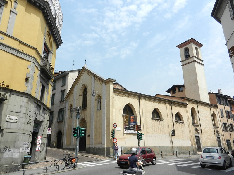 Bergamo - Chiesa di S. Bernardino in Pignolo